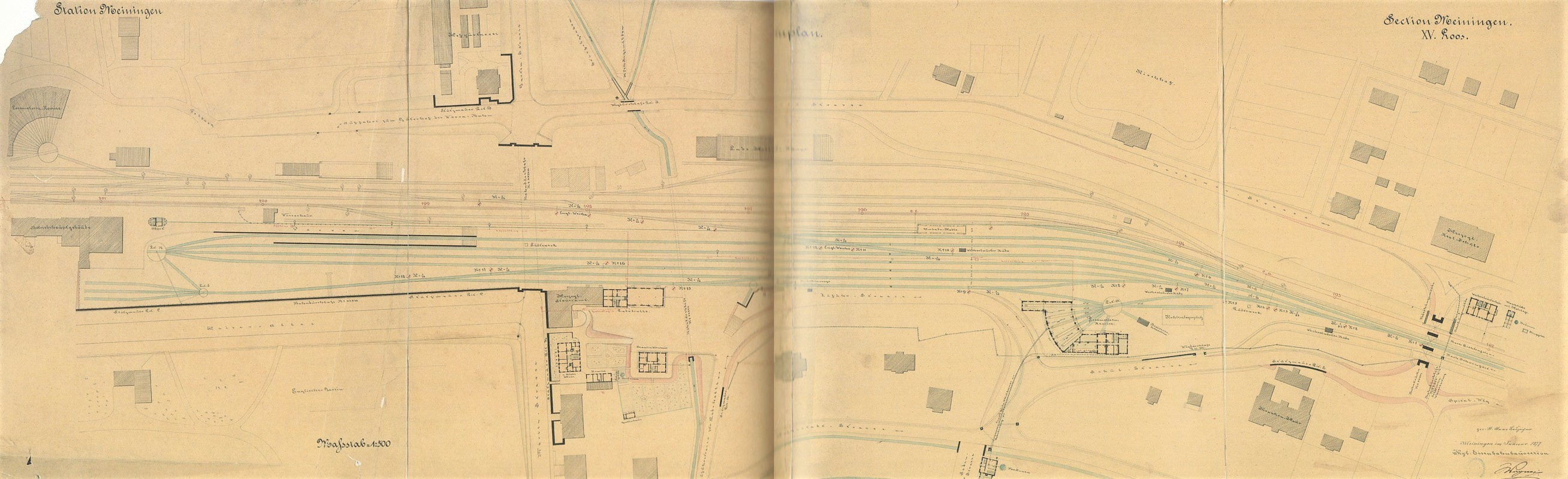 Lageplan vom Bahnhof Meiningen mit dem seperaten Bayerischen Bahnhof (blau gezeichnete Gleise) von 1877. Links das Empfangsgebäude, in der Mitte unten neben dem Tunnel hervorgehoben die Beamtenwohngebäude und Lagerhäuser, rechts hervorgehoben die Lokremise. Insbesondere der Bahnsteigbereich links wurde in den Folgejahren noch erweitert und verändert.